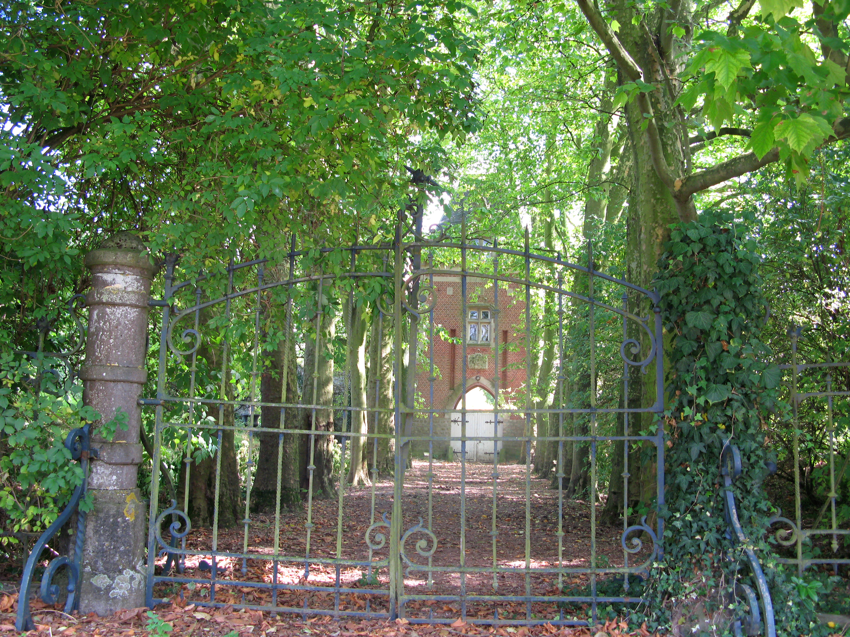 Wiège-Faty (Aisne, France) - Derrière et en contrebas de l'église, de l'autre côté de la rue, se dresse la grille du château de Wiège.